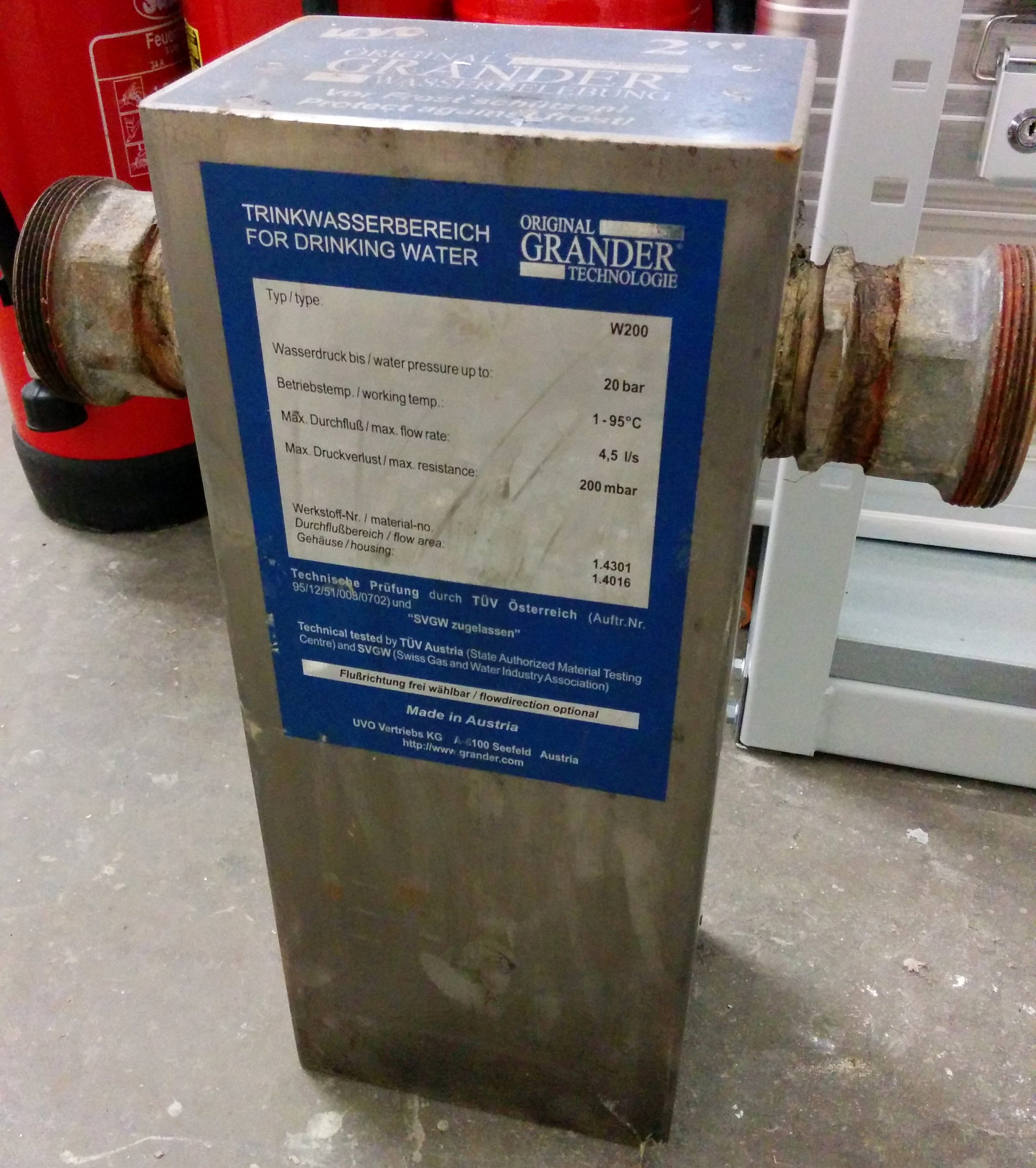 Einbaumodul in Hauptwasserleitungen von Wohngebäuden zur esoterischen Wasserbelebung.